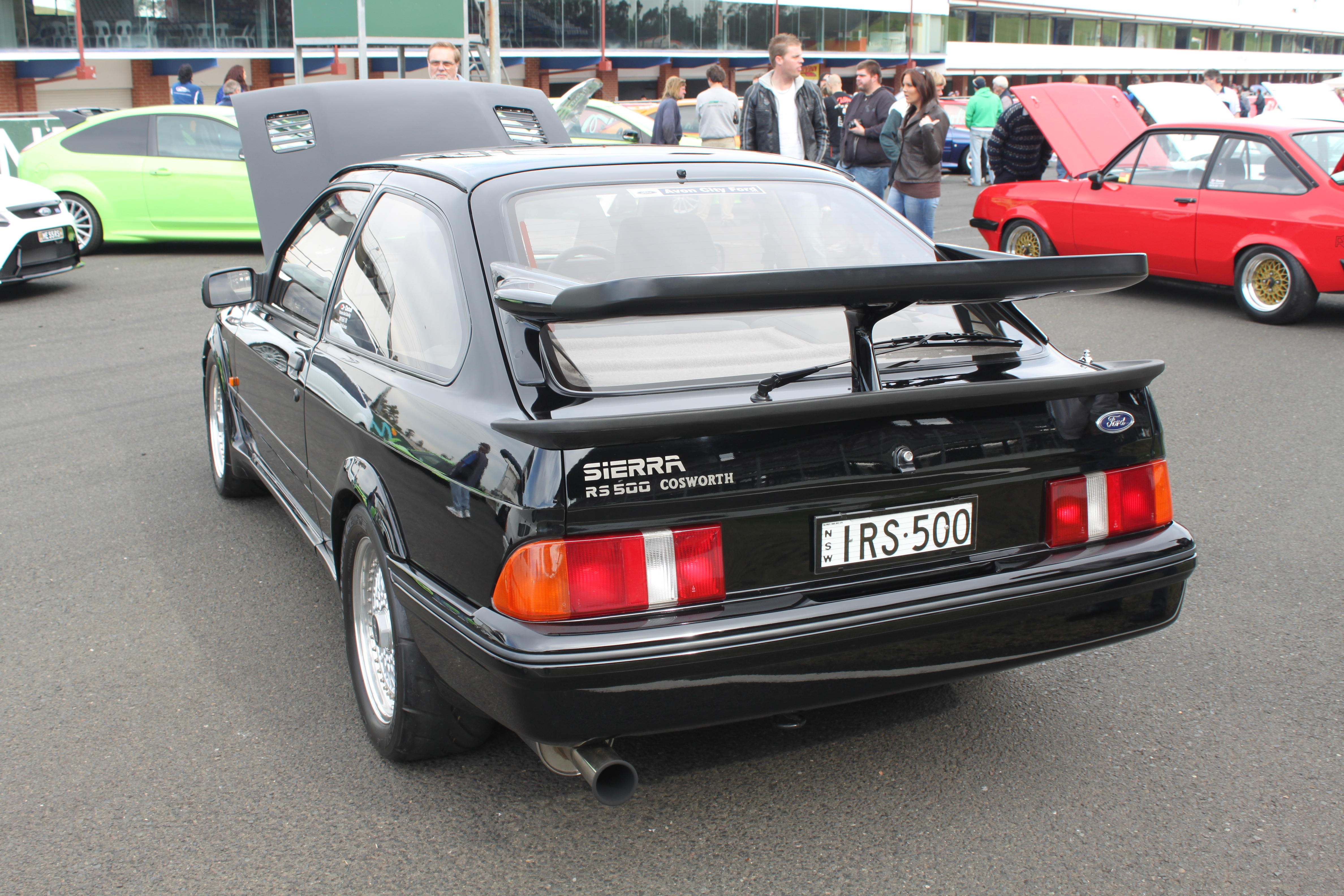 Ford Sierra RS500